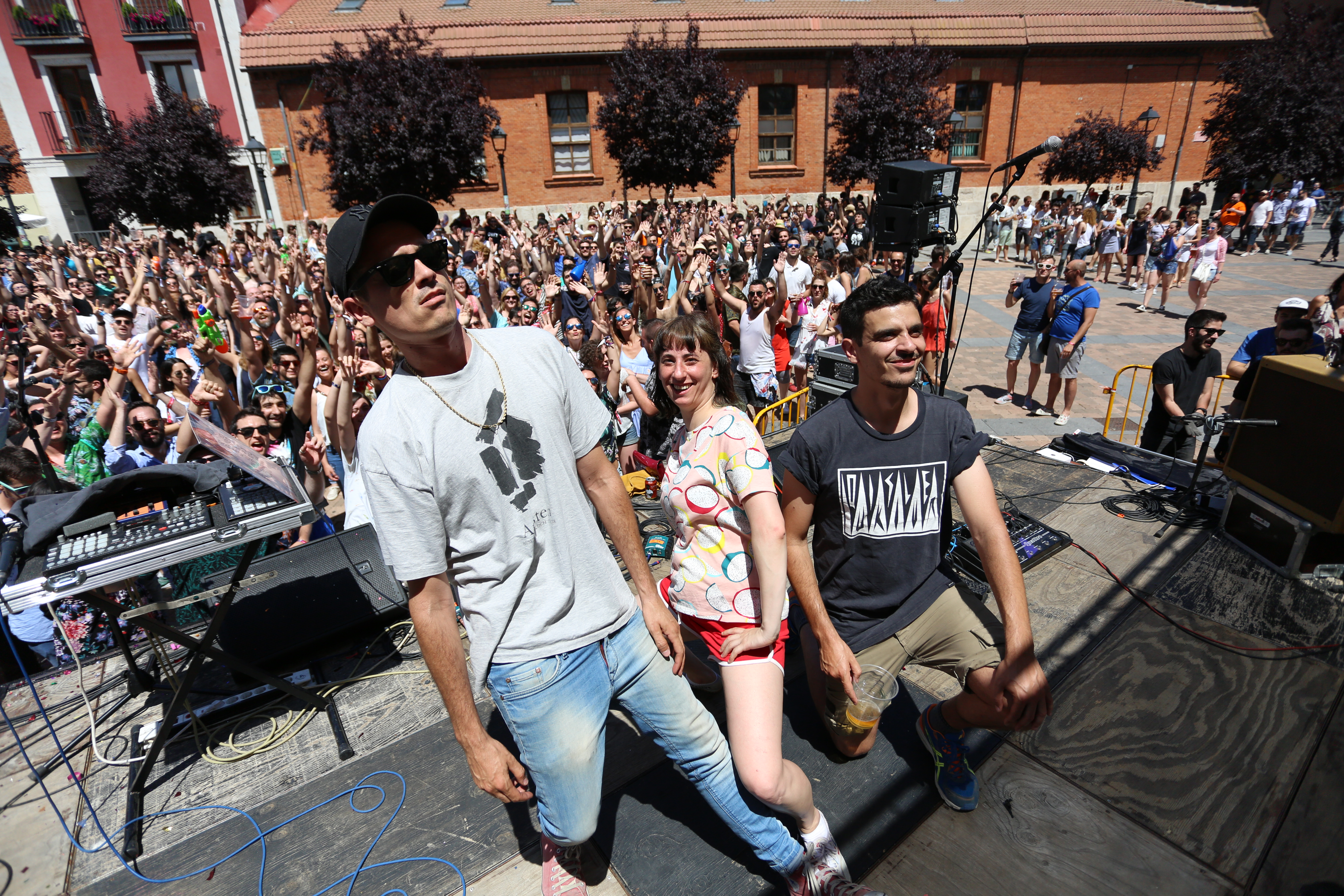 El grupo Los Ganglios en el festival Palencia Sonora 2017.